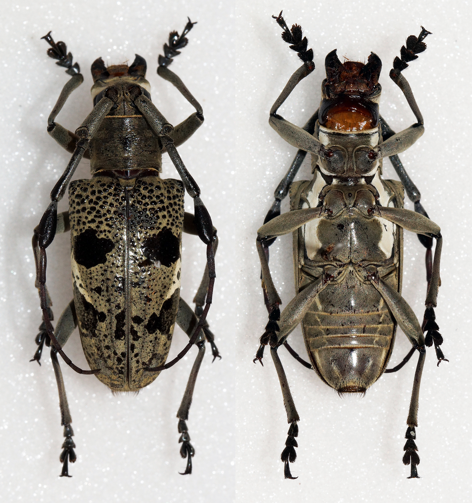 Pascoe,1857 Sex: Female Data: 18-03-14 - Tongod 500m - Sabah - Malaysia Size: 24mm